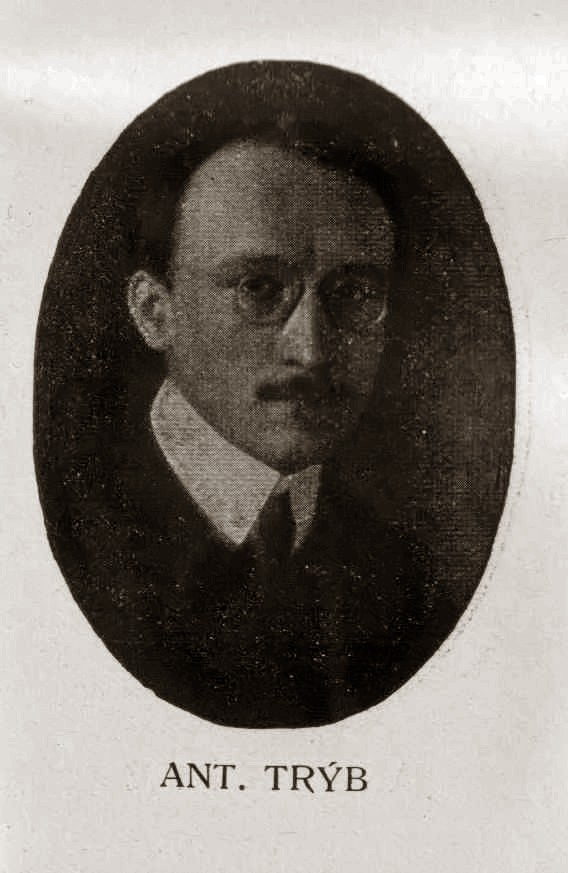 Antonín Trýb (1884 - 1860), Český lékař, básník a spisovatel.